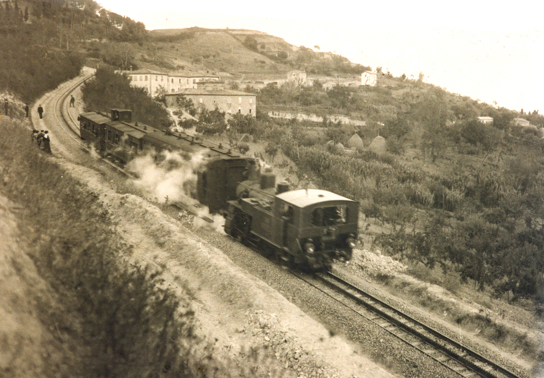 1912 circa - Uno dei primi convogli in transito che procede ancora tra la curiosità della popolazione